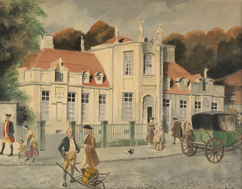 Berlin, Villa Kamecke in der Dorotheenstraße, im Vordergrund figürliche Staffage. Anonymes Aquarell. 26 x 36 cm